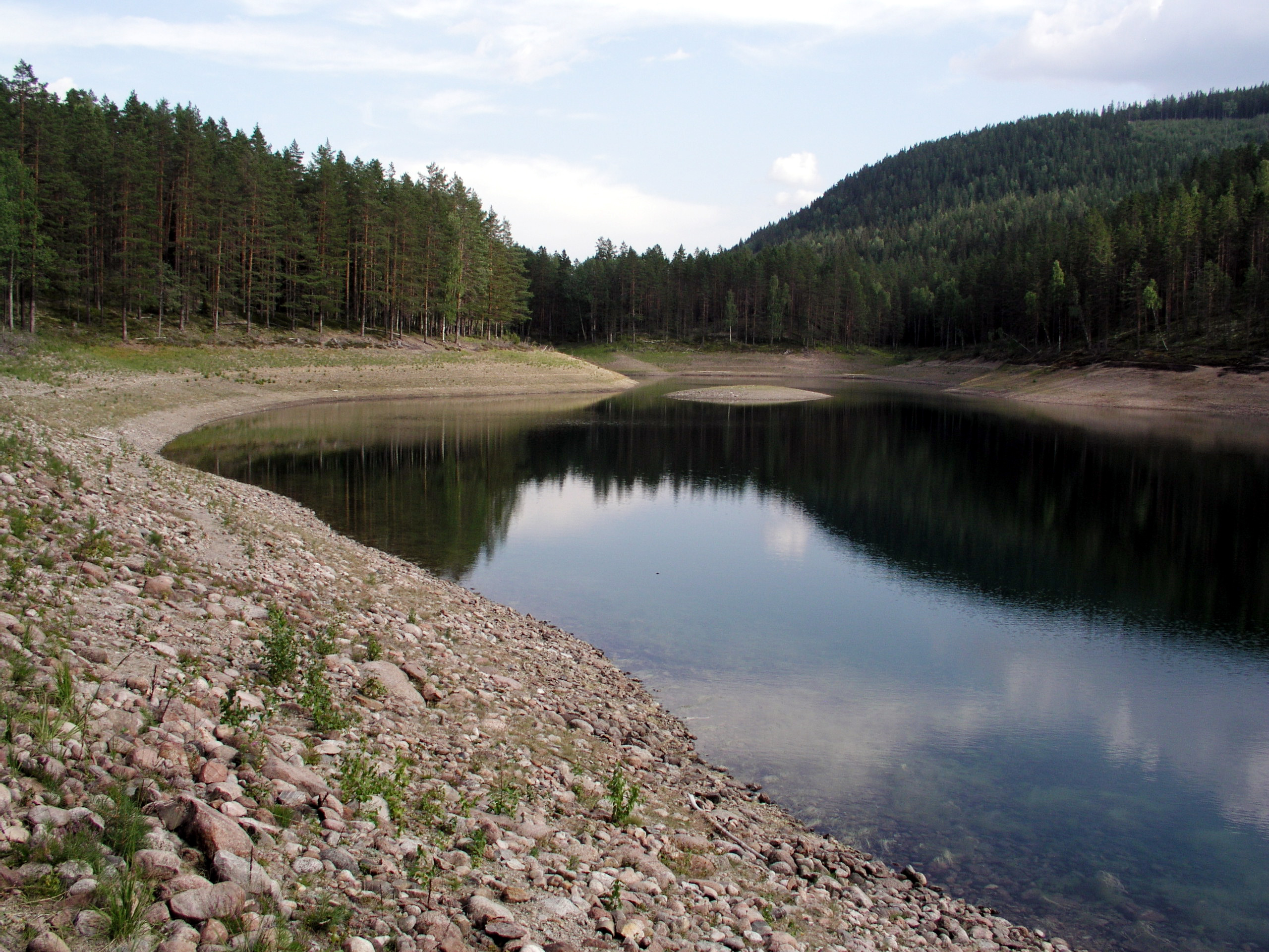 Gröntjärn, cold spring well (lake) of water, Ljusdal kommun, Gröntjärn nature reserve